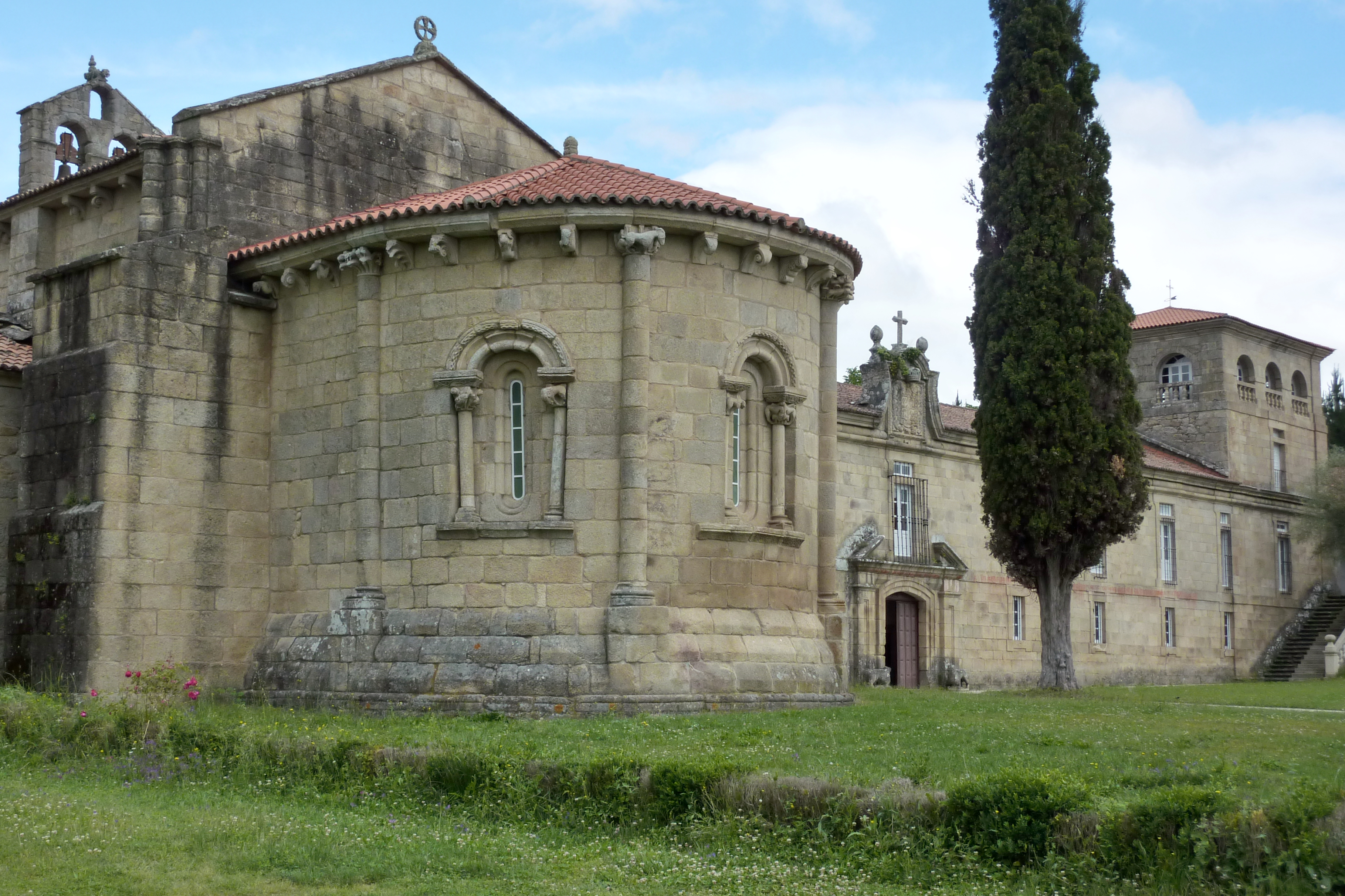 Zisterzienserinnenkloster Santa María de Ferreira de Pantón in Pantón in der spanischen Provinz Lugo (Galicien), Kirche und Klostergebäude